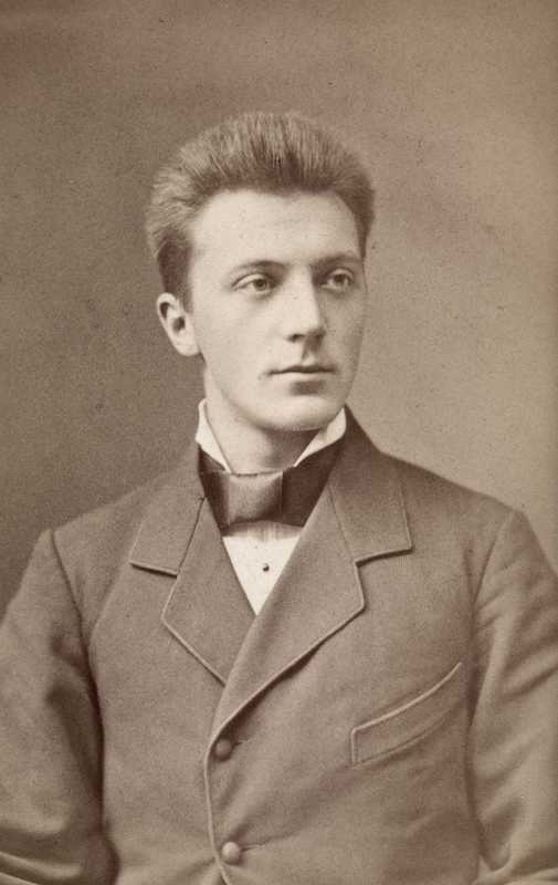 Axel Holst (født 6. september 1860 i Christiania, død 26. april 1931 samme sted) var en norsk lege og professor i medisin